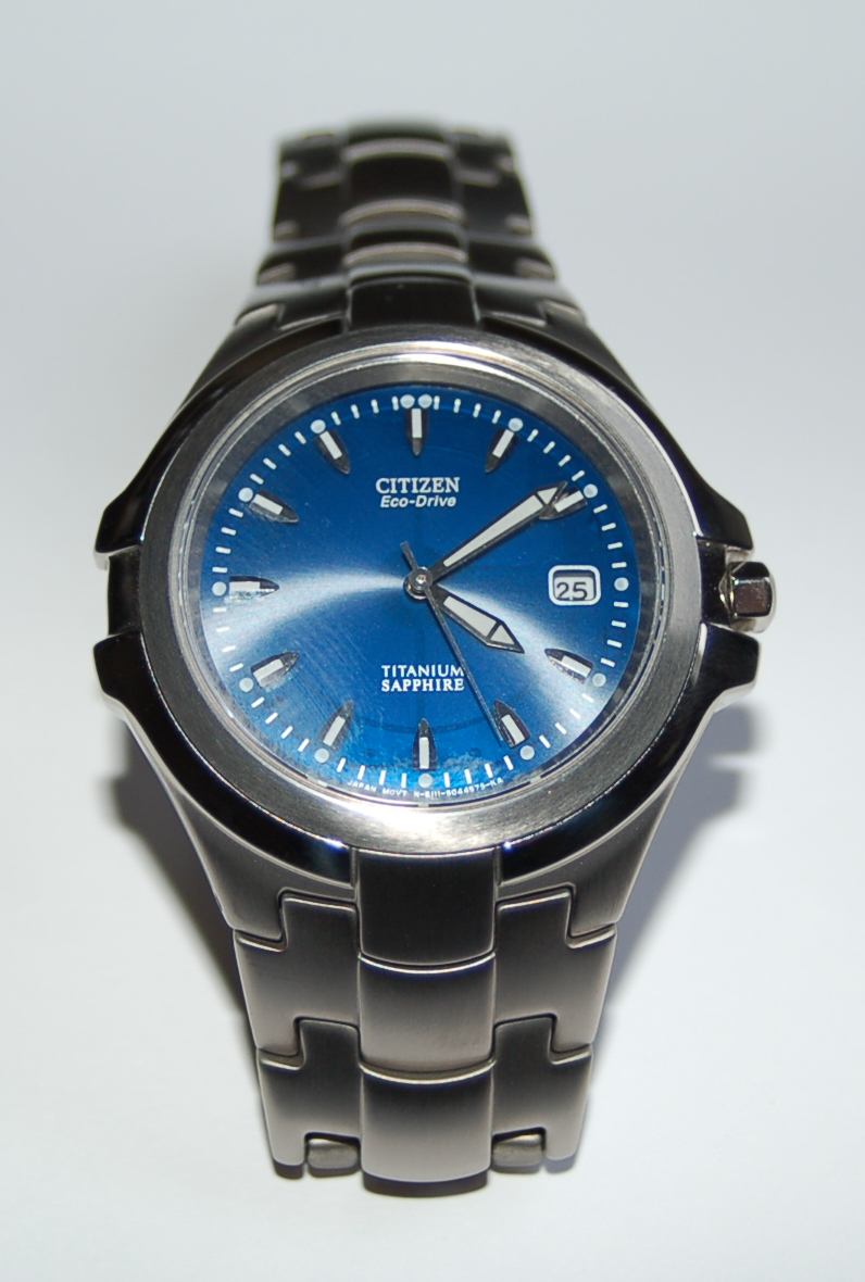 Citizen Marinaut Titan GN 4W S Eco-Drive